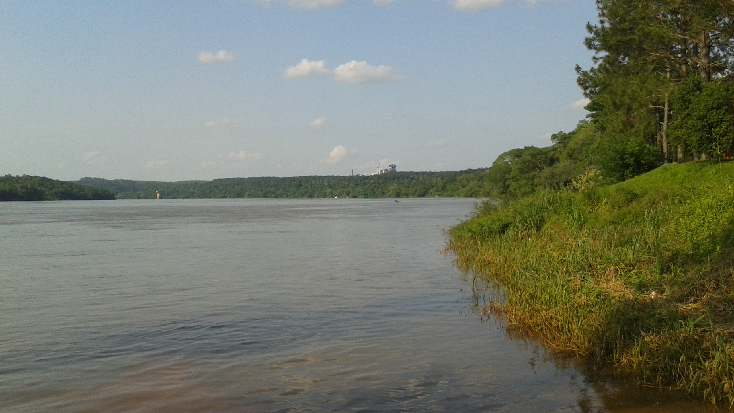 Río Paraná en Puerto Mineral con vista de fondo de planta de Papel Misionero (PM). Fuente: Periodista Horacio Cambeiro.